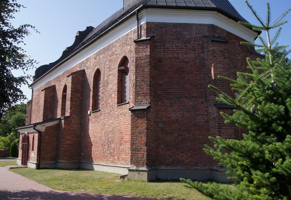 Secemin - dawny zbór kalwiński Szafrańców z XVI wieku.